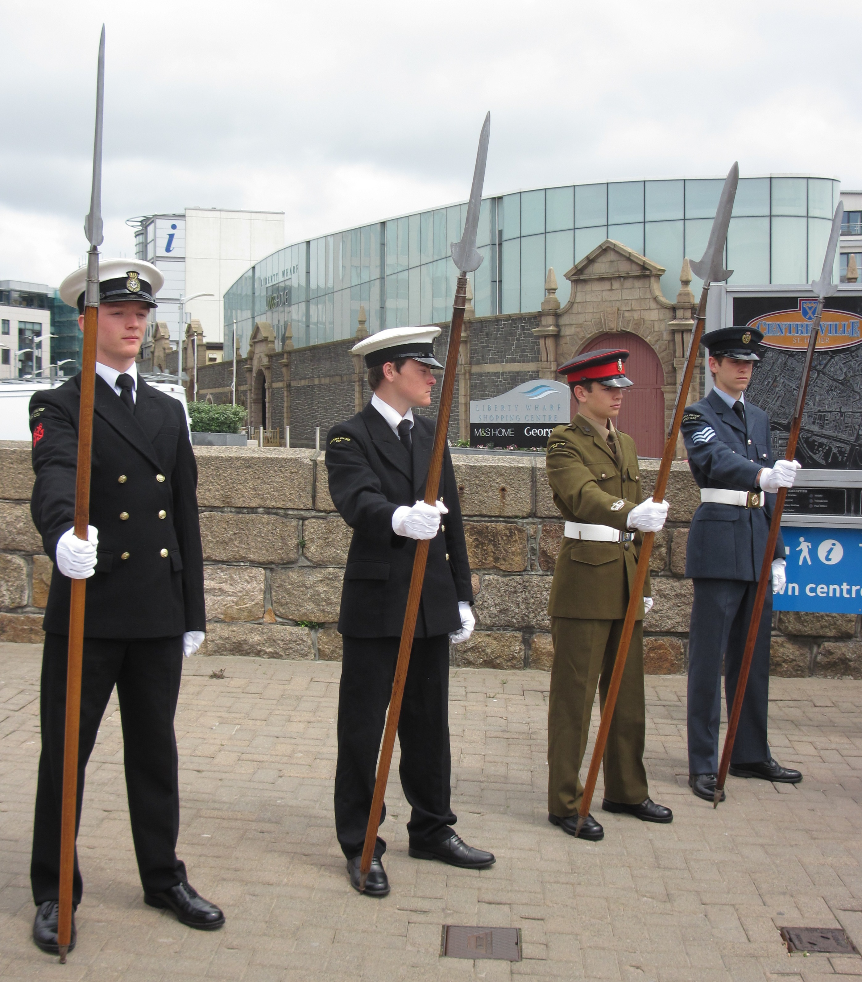 Commémoration de l'Appel du 18 Juin 1940 à Saint Hélier, Jersey, le 18 juin 2013: lecture du texte de l'appel par un collégien du Collège Victoria en présence du Consul de France à Jersey, du Connétable de Saint Hélier, du représentant du Lieutenant-Gouverneur de Jersey, d'anciens combattants, et de membres de la Gendarmerie maritime de France (du patrouilleur Géranium), au monument des Français Libres situé au port de Saint Hélier.